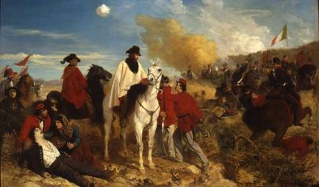 Giuseppe Garibaldi (in bianco) difende Roma dall'assedio francese durante la Repubblica romana (1849).